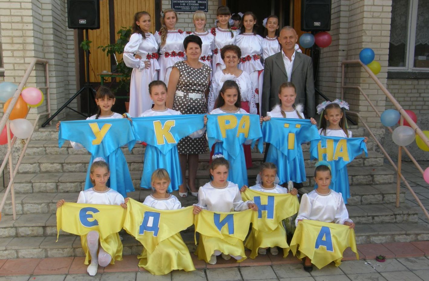 самотоевская школа